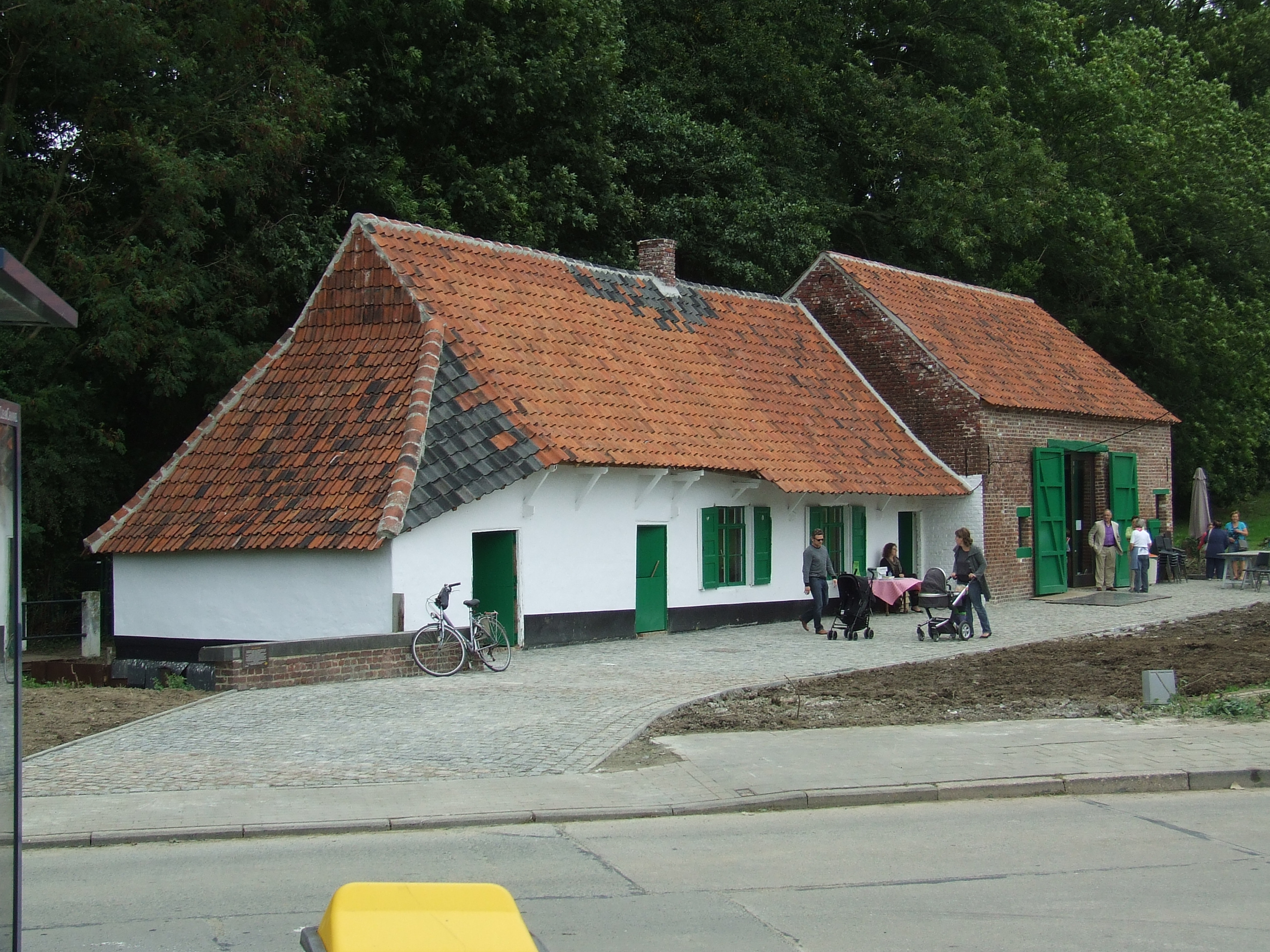 België, Vlaams-Brabant, Dilbeek, Dorpsplein nr.5; huis Mostinckx - leemen hoeve